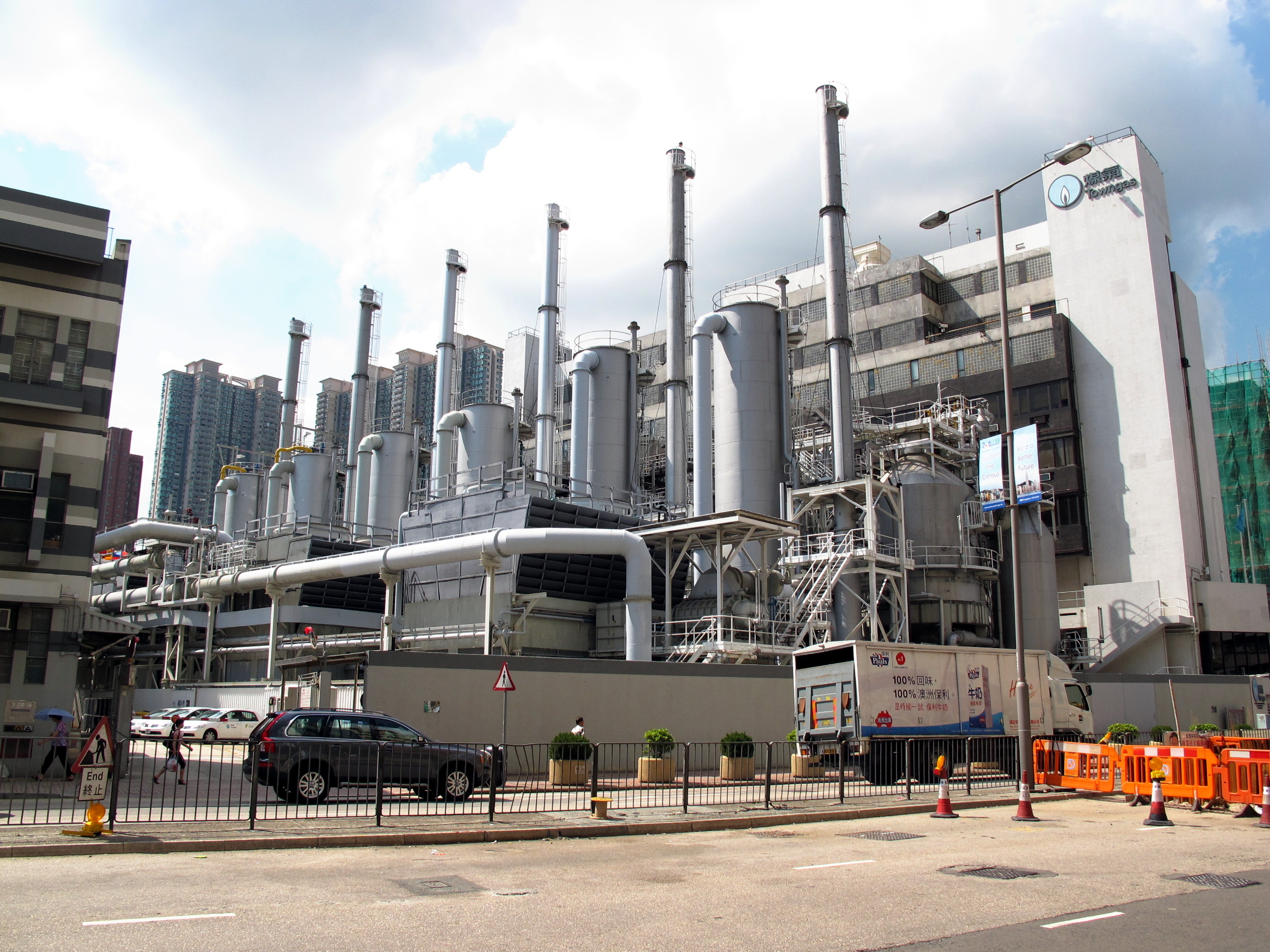 Towngas Ma Tau Kok Plant